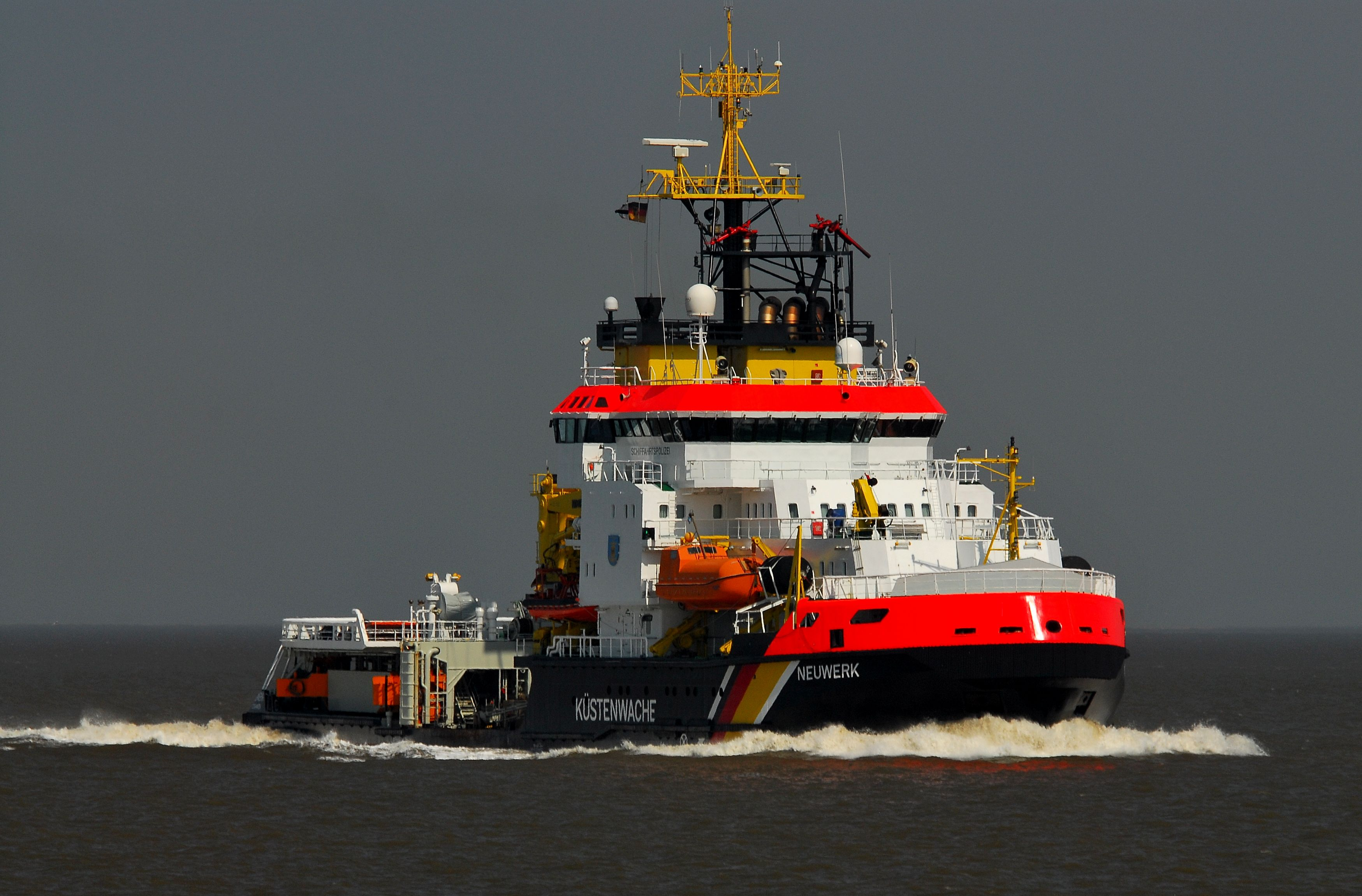 Von Helgoland Kommend in Cuxhaven einlaufend